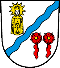 Wappen von Jona SG